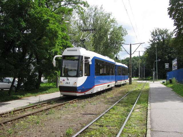 Linia 3